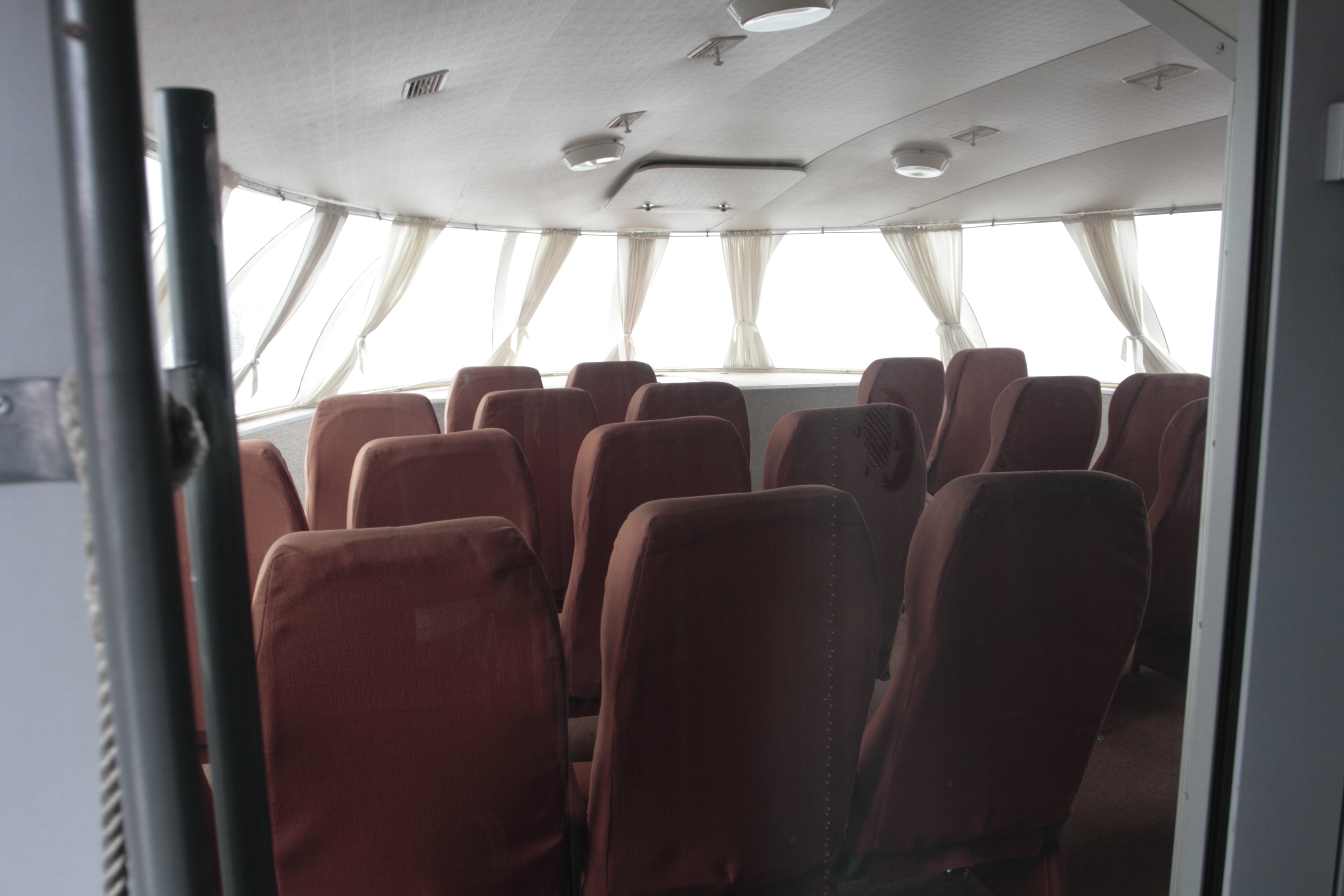 Носовой салон "Метеора"